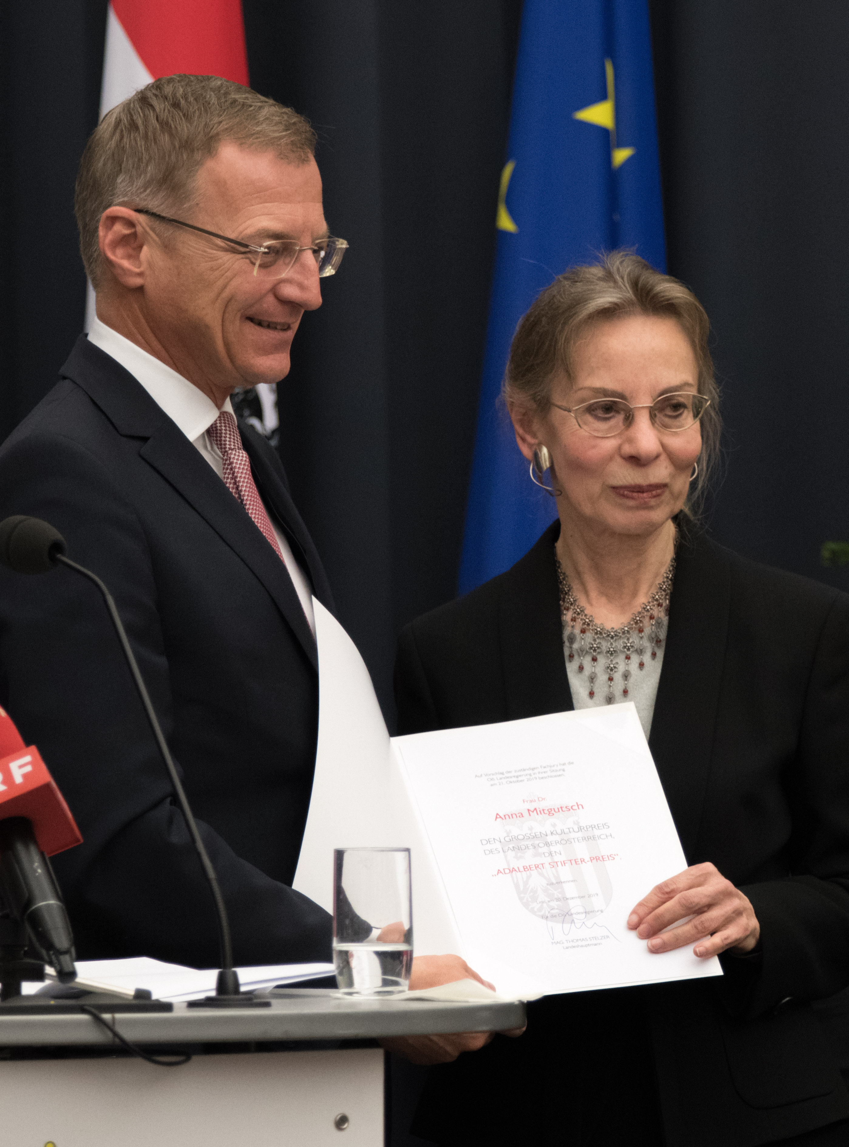 Anna Mitgutsch bei der Verleihung des Großen OÖ Landeskulturpreises 2019 in Linz mit Landeshauptmann Thomas Stelzer